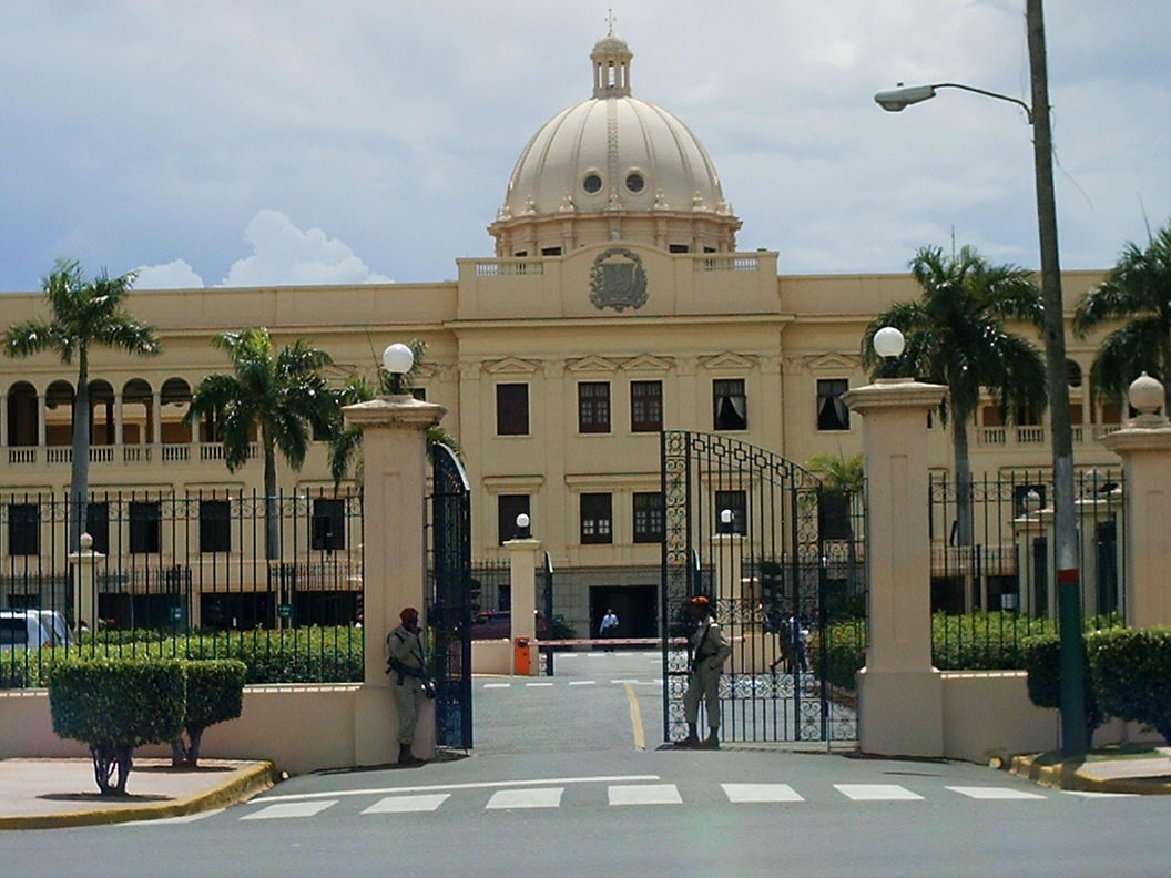 Descripción: El Palacio Nacional de la República Dominicana. Autor: José Grullón (quien escribe). Fuente: Propia.